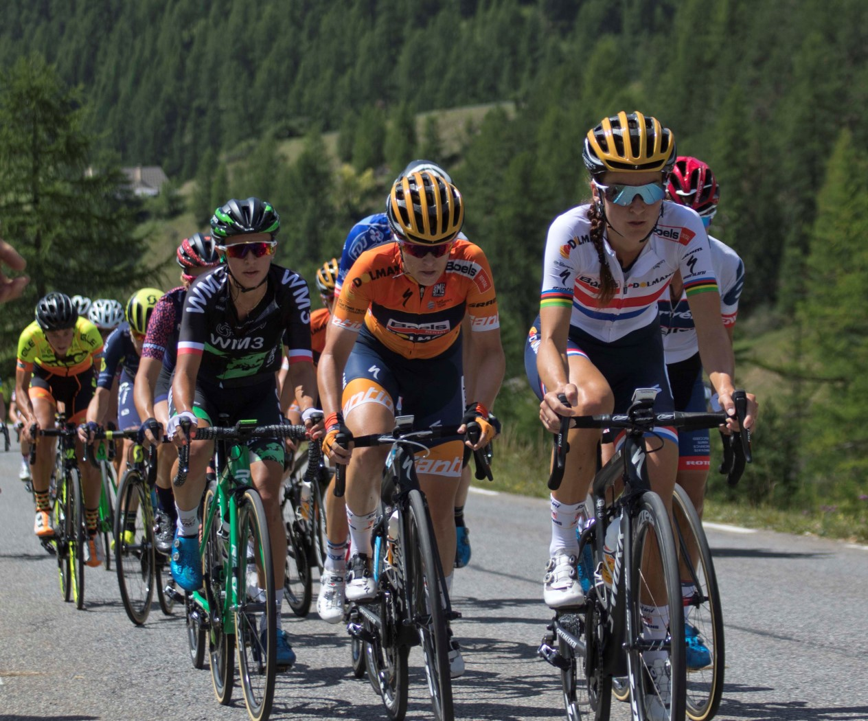 Elizabeth Deignan op de Col d'Izoard tijdens de eerste etappe van La Course 2017